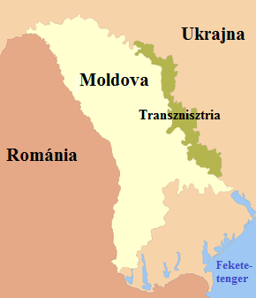 A Dnyeszter-menti Köztársaság térképe a környező államokkal